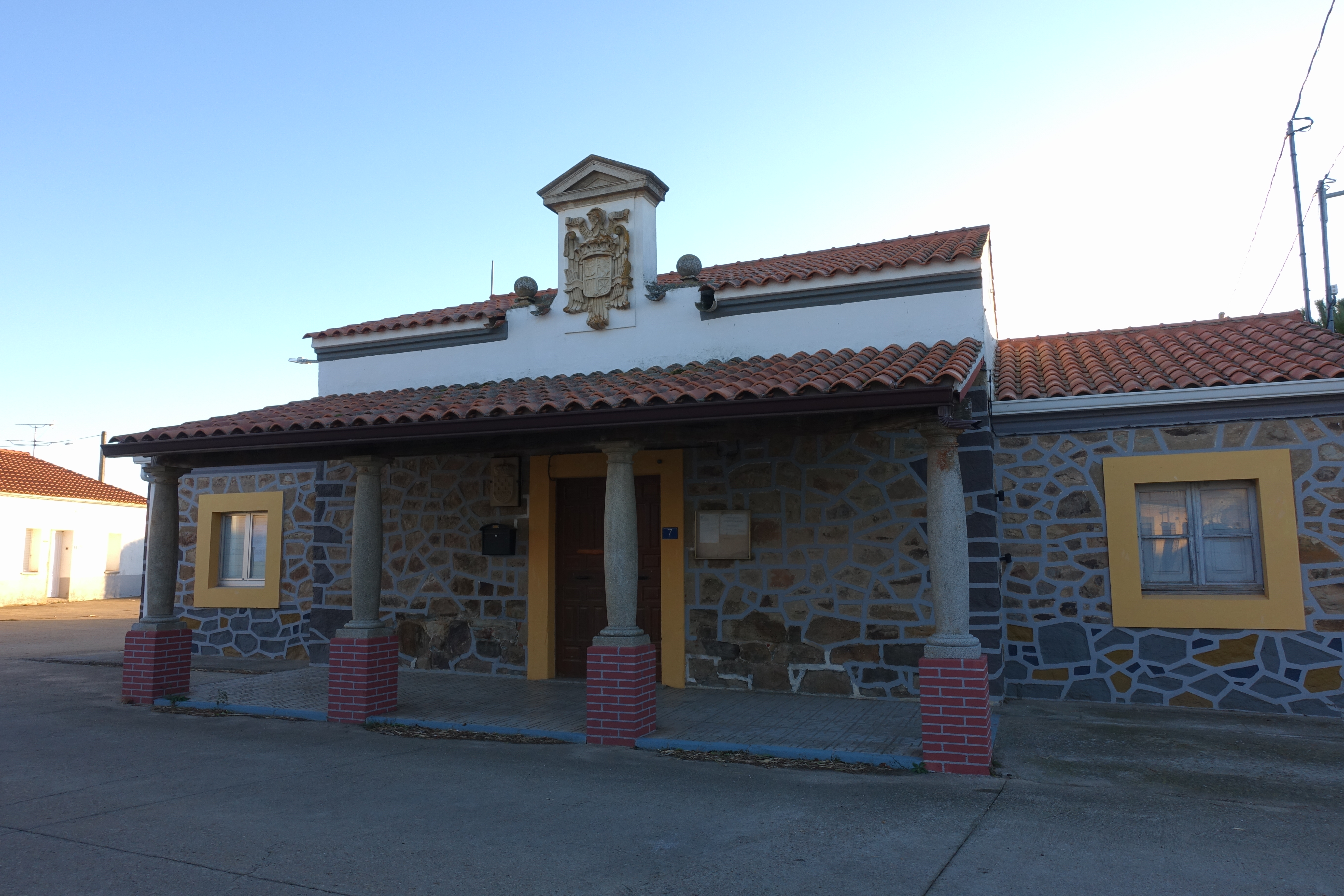 Casa consistorial de Berrocal de Huebra (Salamanca, España).